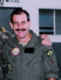 Ten Cel Pavanello - 4º Batalhão_de Aviação do Exército